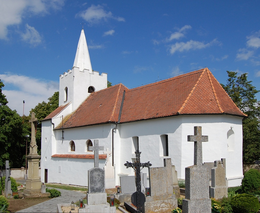 Kostel sv. Václava (Dolní Dubňany), Dolní Dubňany